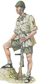 Sottufficiale VIII BTG GUA PAR - El Alamein